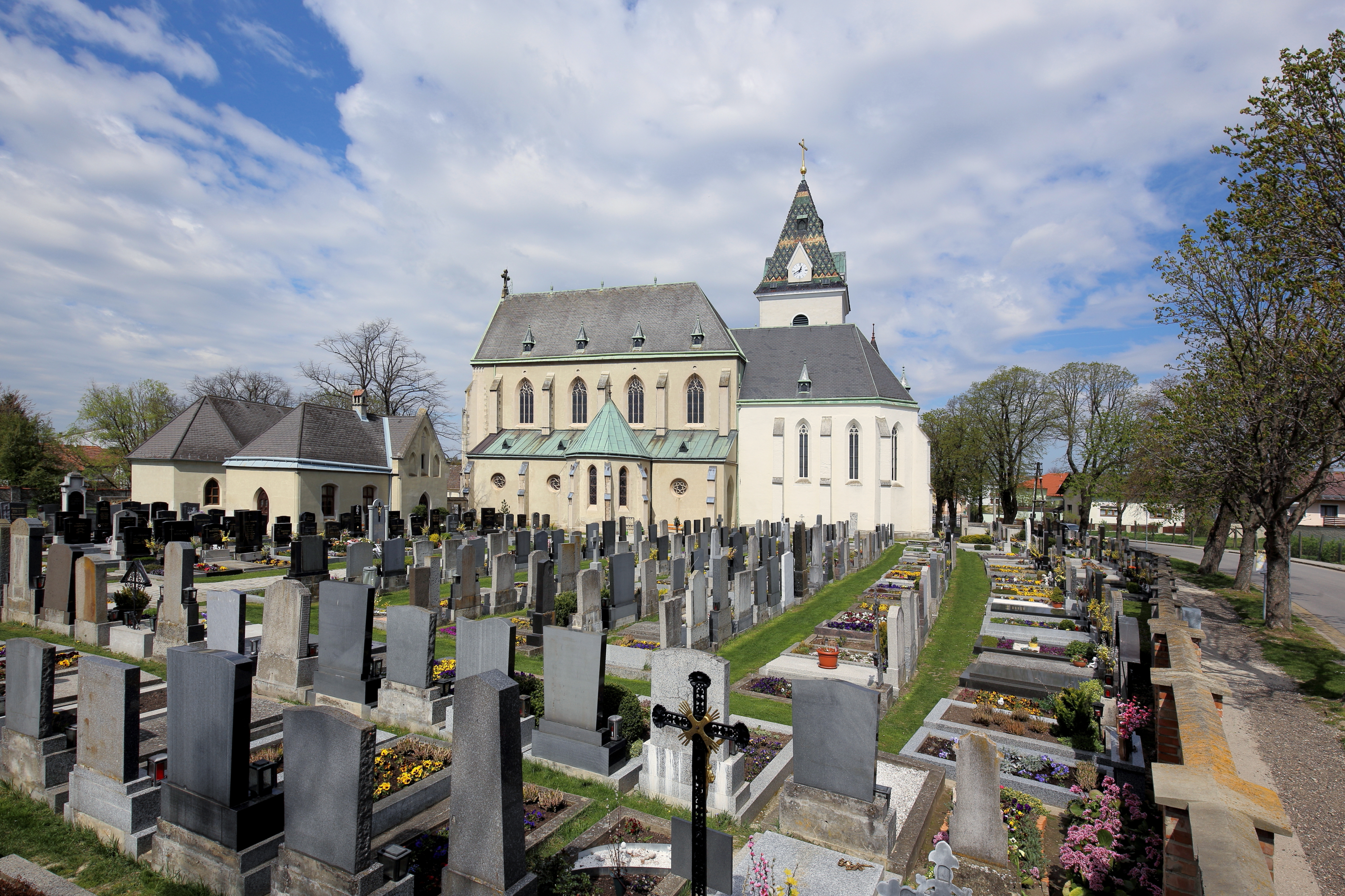 Südansicht der katholischen Pfarrkirche Mariae Himmelfahrt in der niederösterreichischen Marktgemeinde Großengersdorf. Der Chor mit 5/8-Schluß wurde Ende des 14. Jahrhunderts errichtet und das Untergeschoß des wuchtigen Nordturmes stammt aus dem 15. Jahrhundert. Das neogotische Langhaus wurde von 1897 bis 1901 nach Plänen des Architekten Eugen Schweigl errichtet.